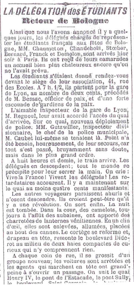 Article (début) du Petit Journal, page 2, relatant le retour de la délégation de l'AGEP aux fêtes étudiantes de Bologne.